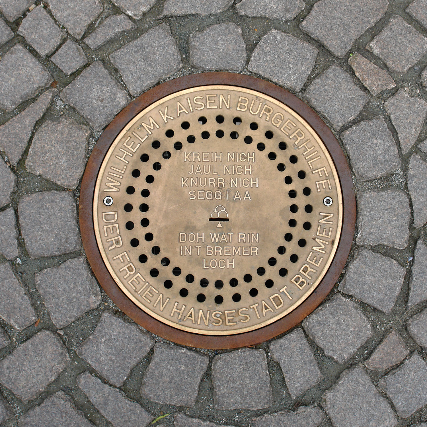 Bremer Marktplatz: Das „Bremer Loch“, eine unterirdische Spendenbüchse mit Geräusch der Stadtmusikanten der Wilhelm-Kaisen-Bürgerhilfe. Installiert Juli 2007